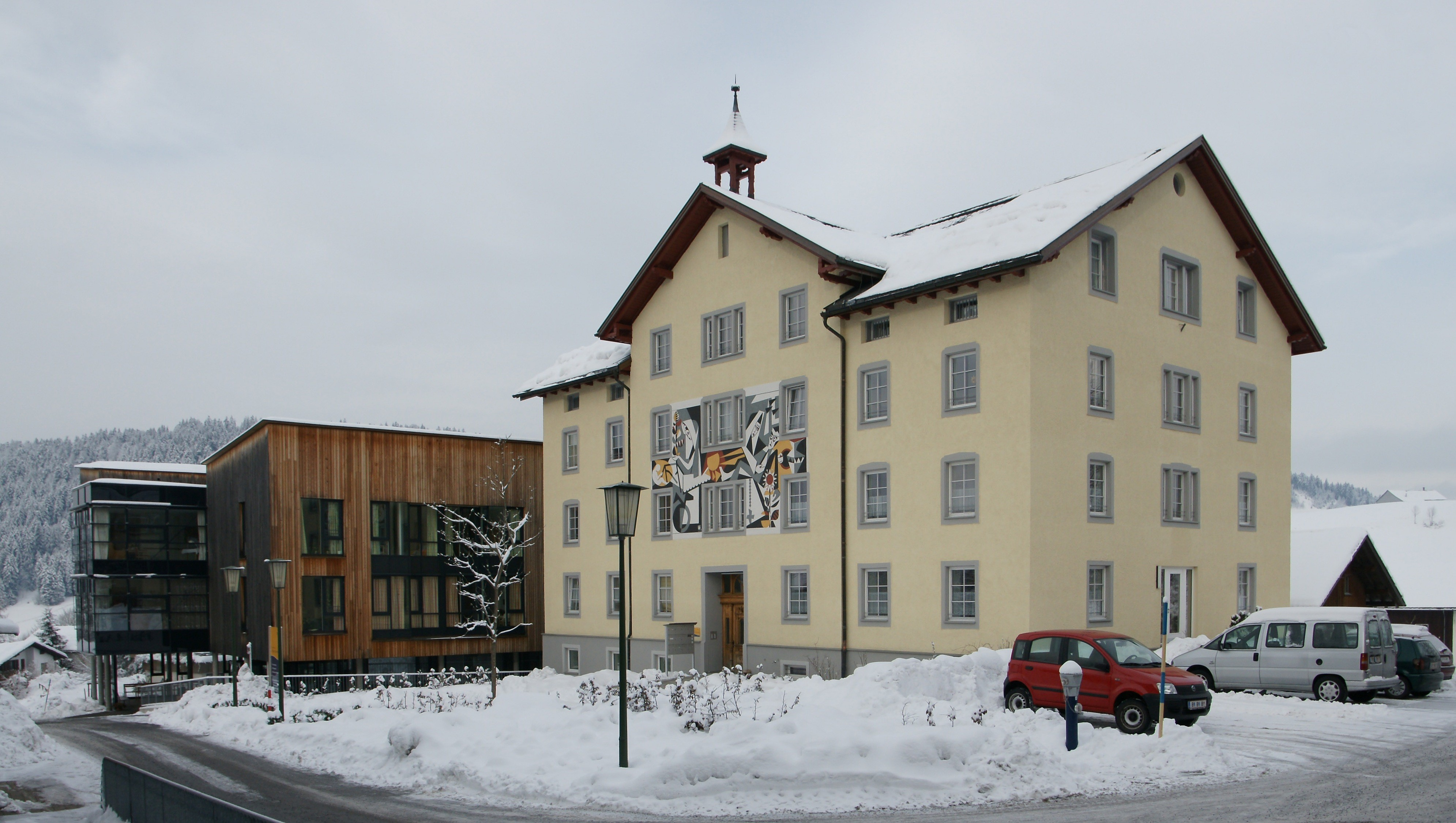 Versorgungsheim, erbaut 1909, mit Sozialzentrum von Alberschwende im Bregenzerwald.